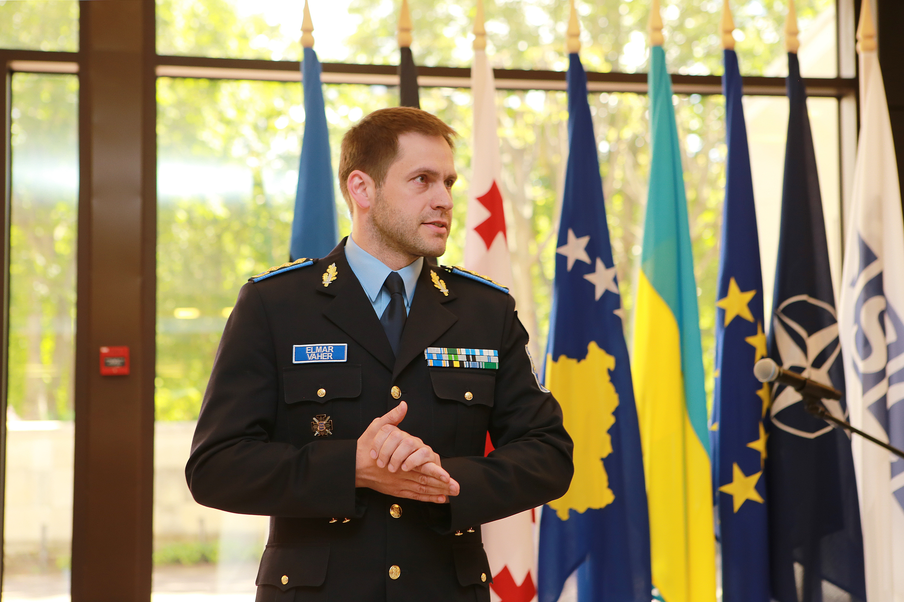 Elmar Vaher, Politsei- ja Piirivalveameti peadirektor